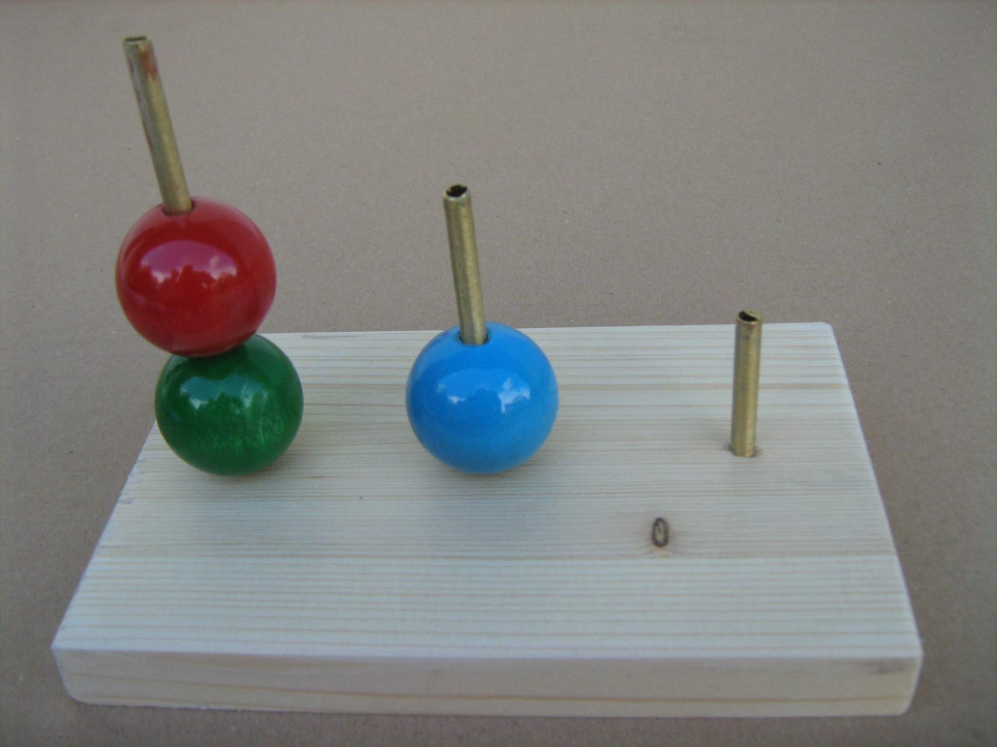 Strumento per la somministrazione del test Torre di Londra.